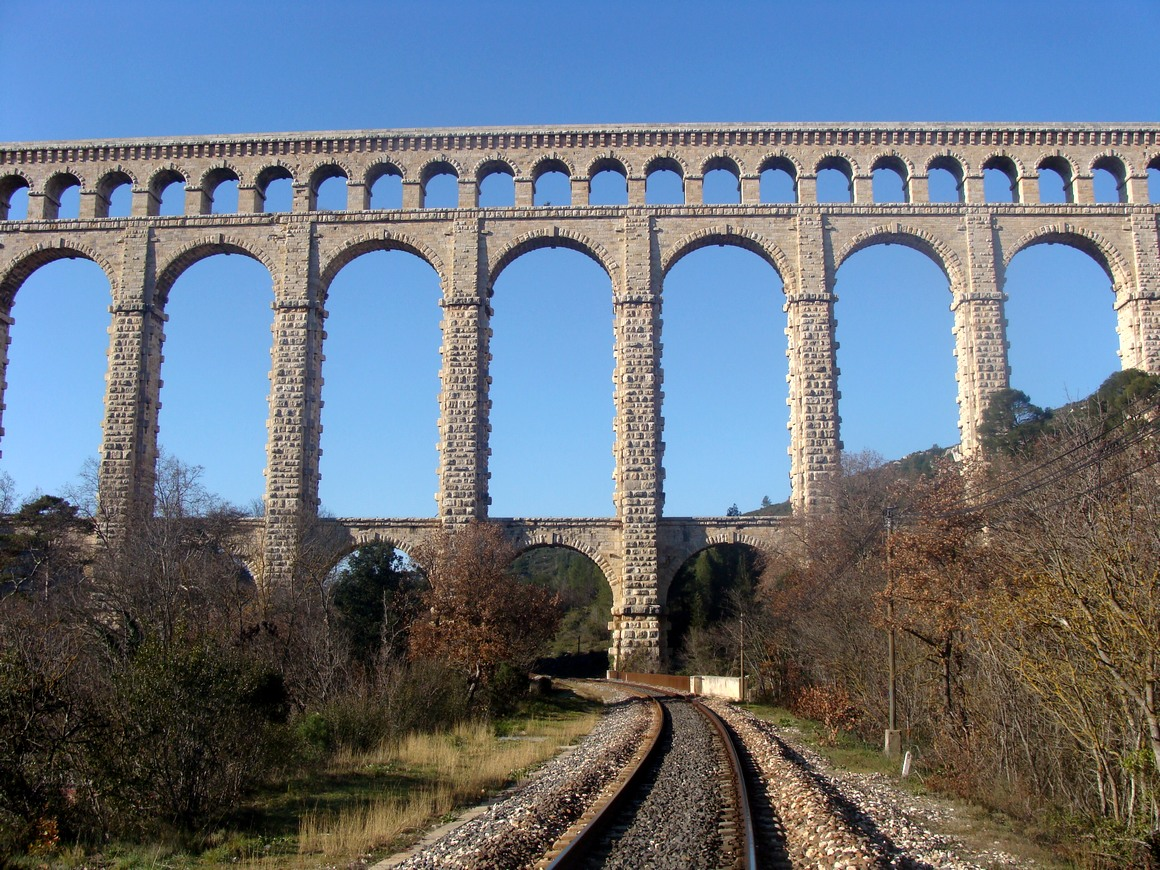 La voie ferrée Rognac - Aix-en-Provence au pied de l'aqueduc de Roquefavour. On aperçoit en avant de l'aqueduc le pont de la voie ferrée sur l'Arc et sur la route D 64. Vue prise de l'est.